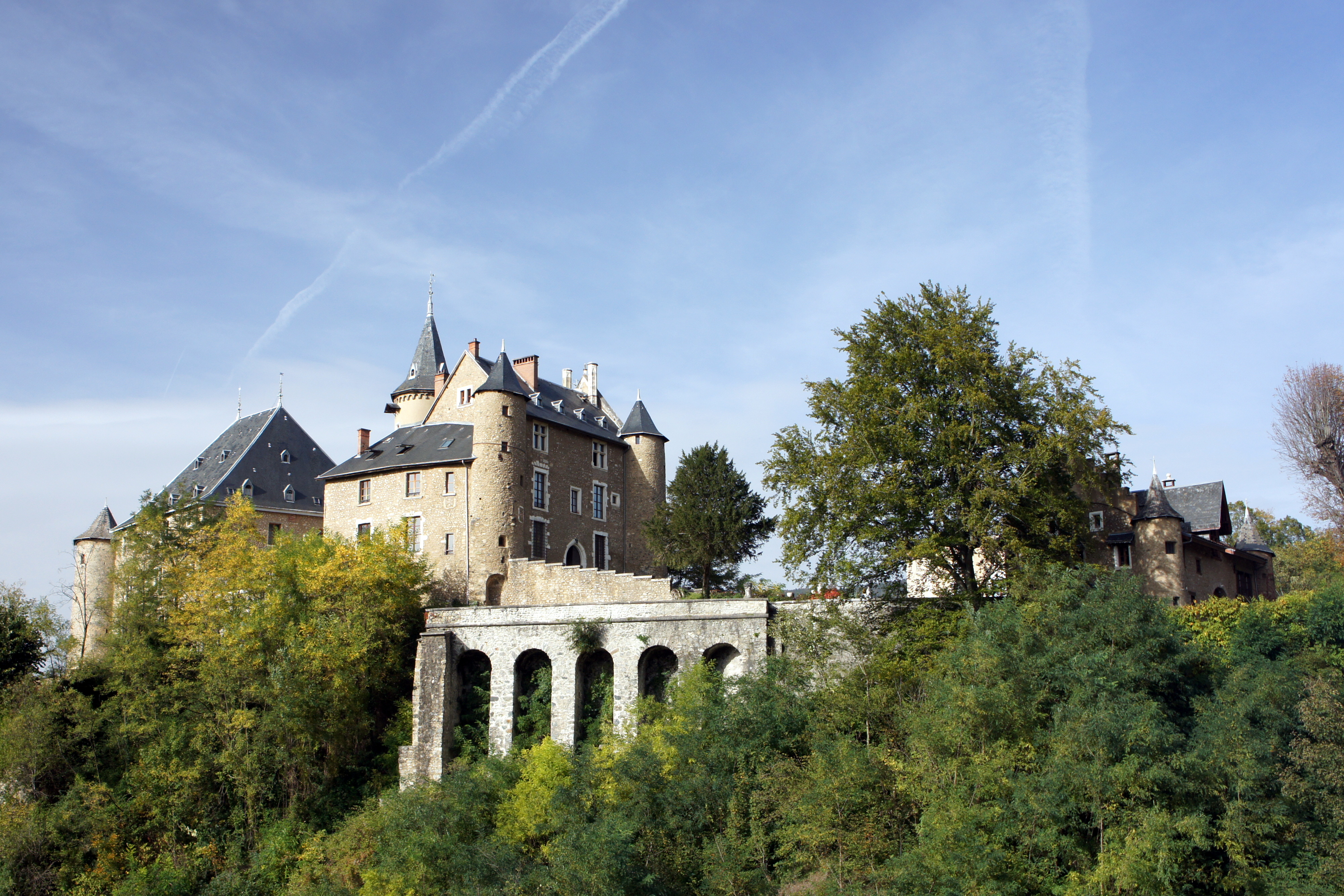 Château d'Uriage (InscritClassé) .